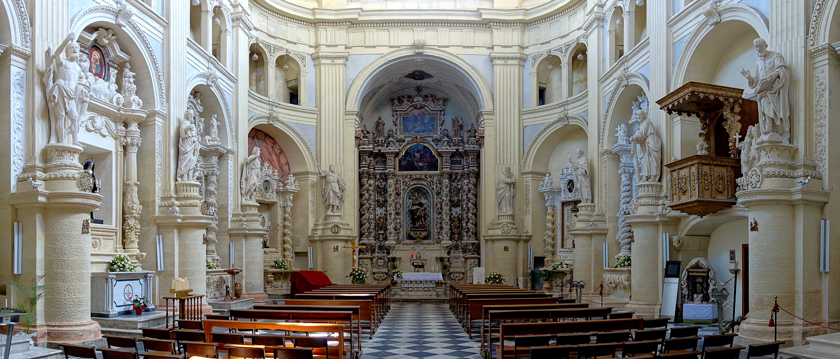 La nef de l'église San Matteo de Lecce.